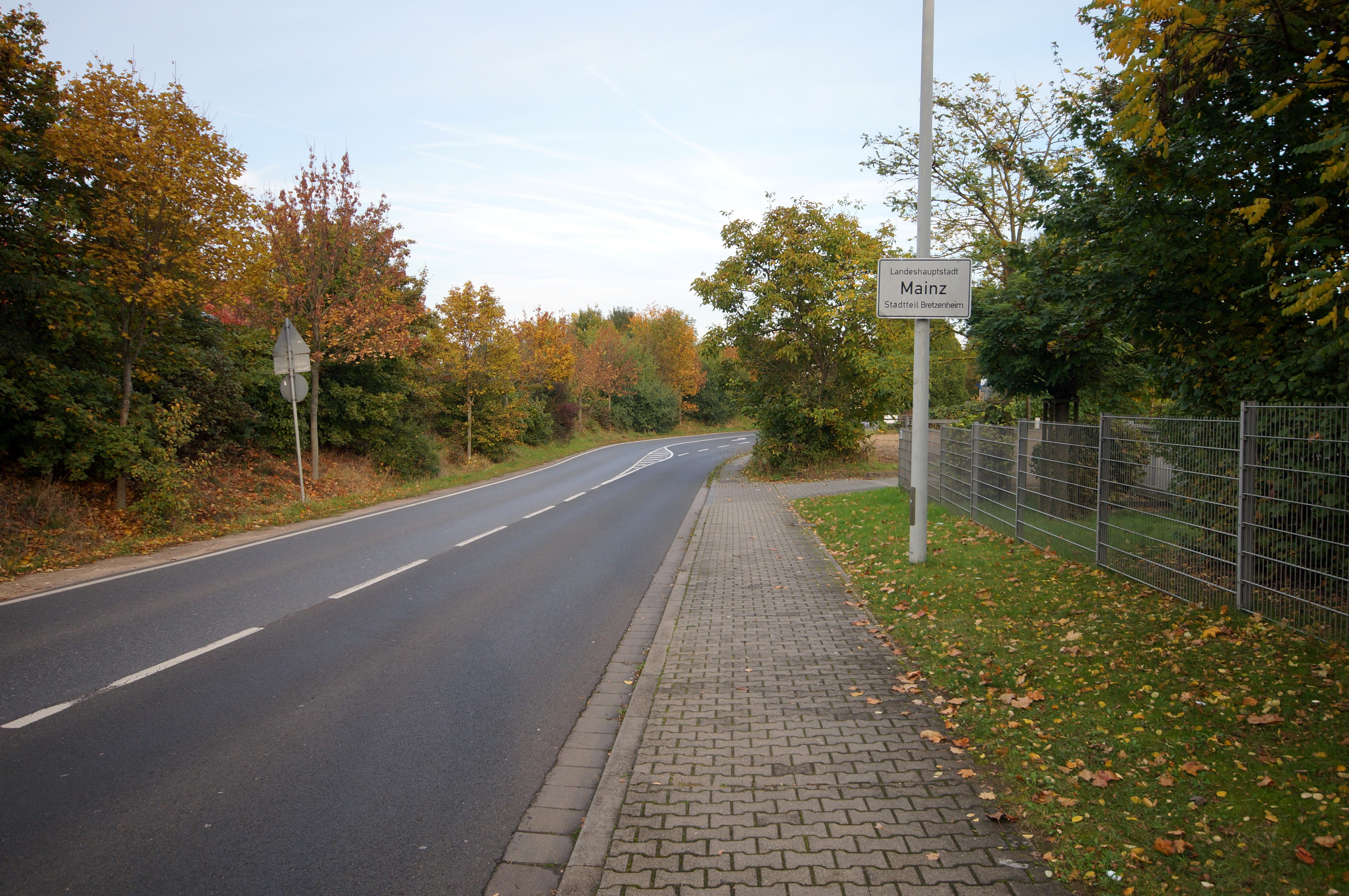 Die Stadteinfahrt von Mainz-Bretzenheim von der K 1 kommend.